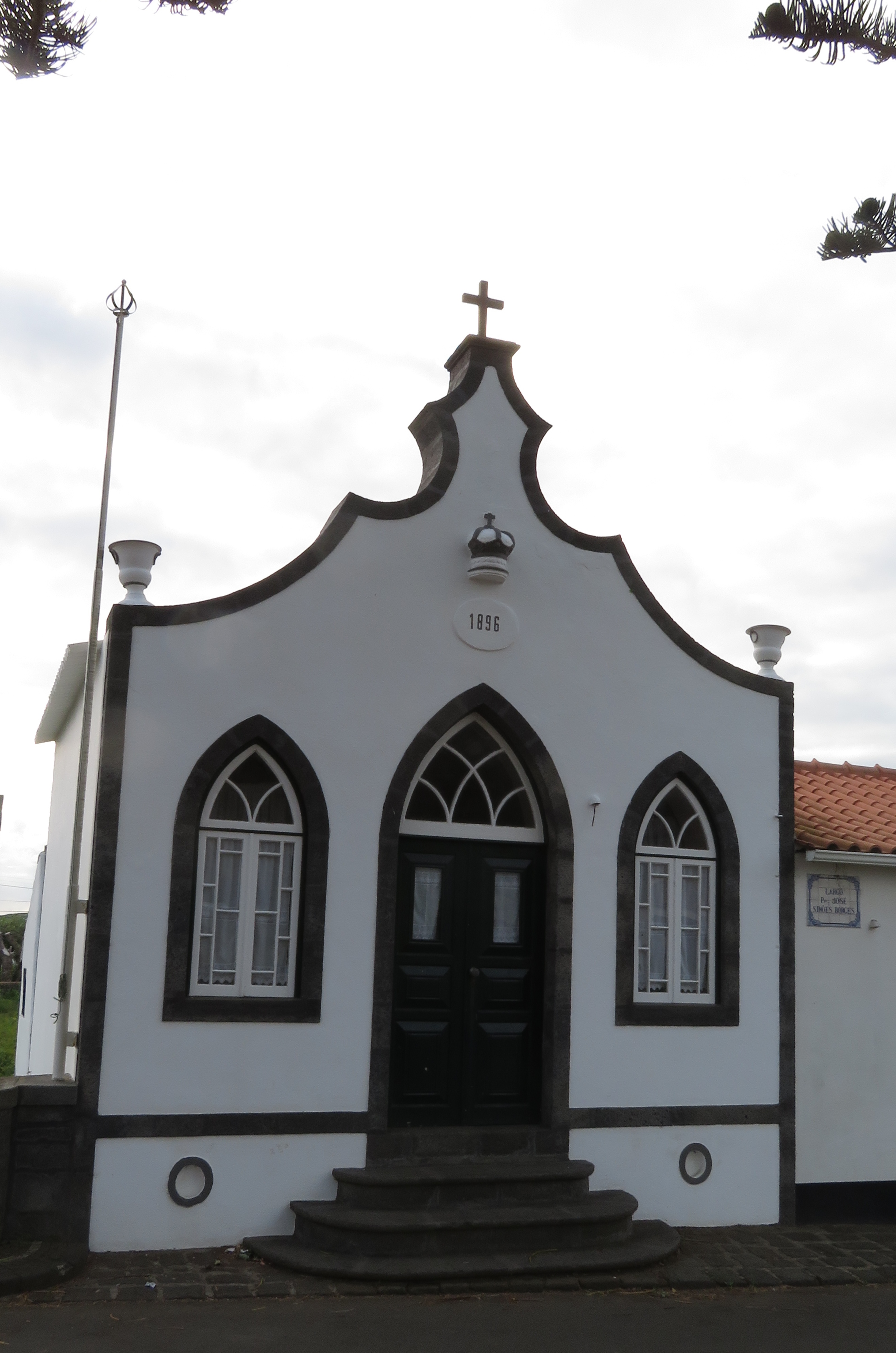 Império de Guadalupe, ilha Graciosa, Acores, Portugal